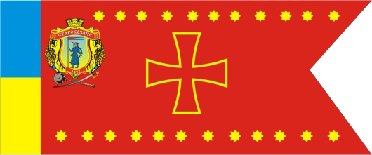 Прапор села Старокозаче